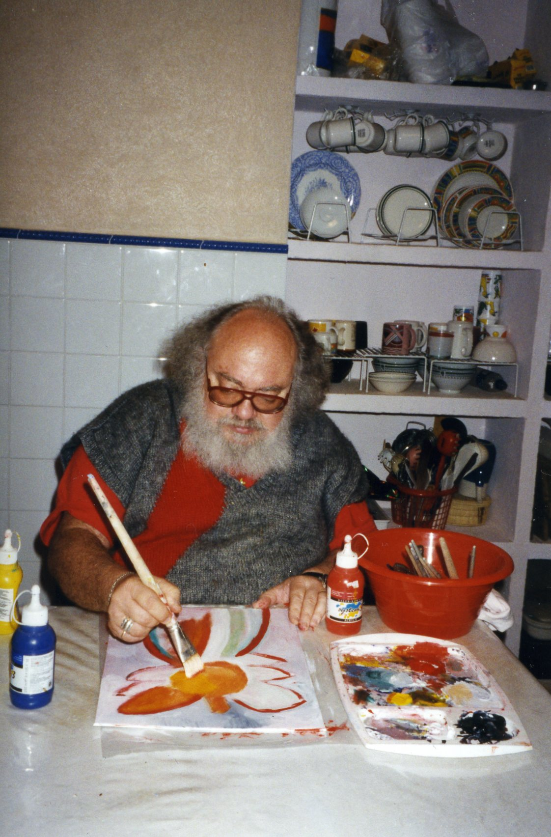 Zipacná de León pintando.